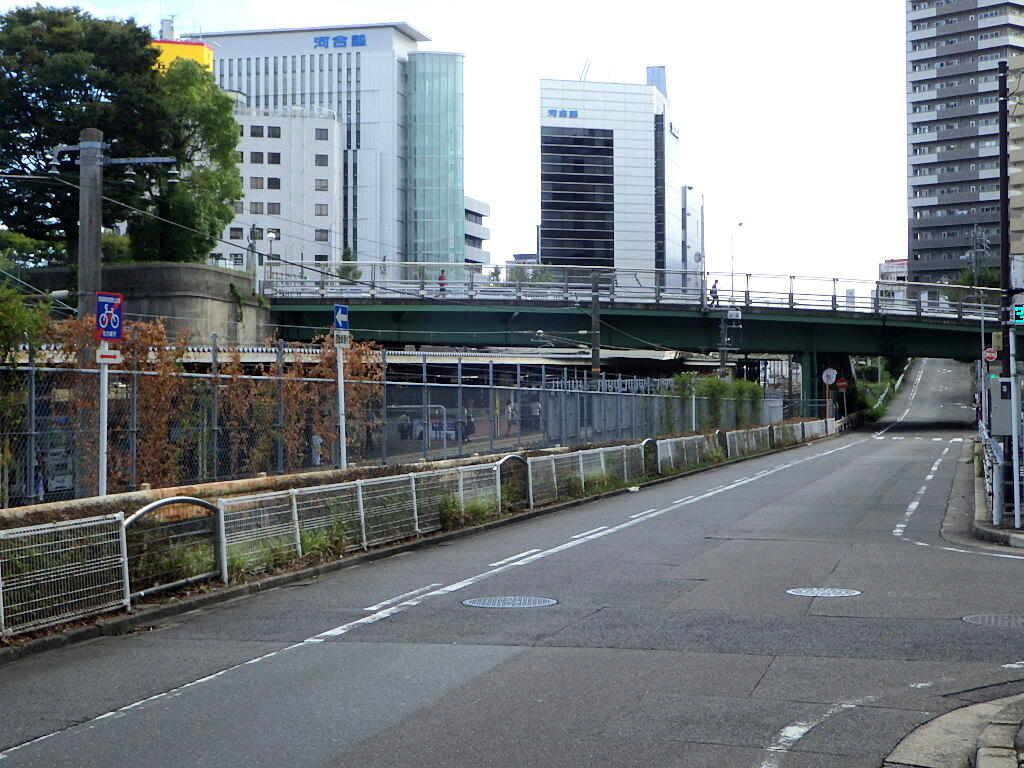 JR千種駅直上を跨線橋（新千種橋）にて越える錦通。